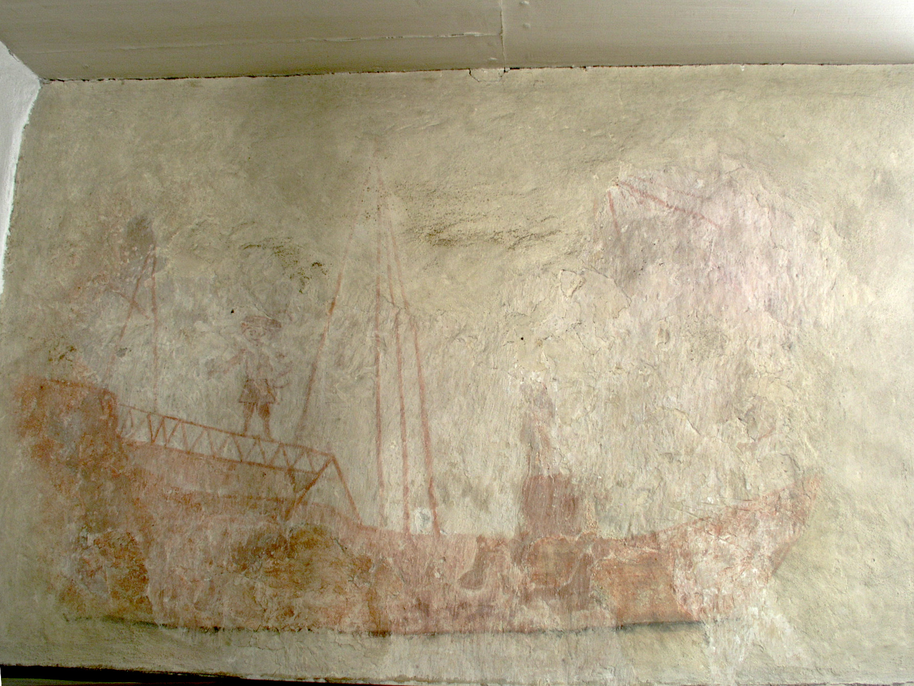 Ventlinge kyrka, Mörbylånga, Öland Mural painting. The picture was taken the 2nd of August 2005 by Håkan Svensson (Xauxa).